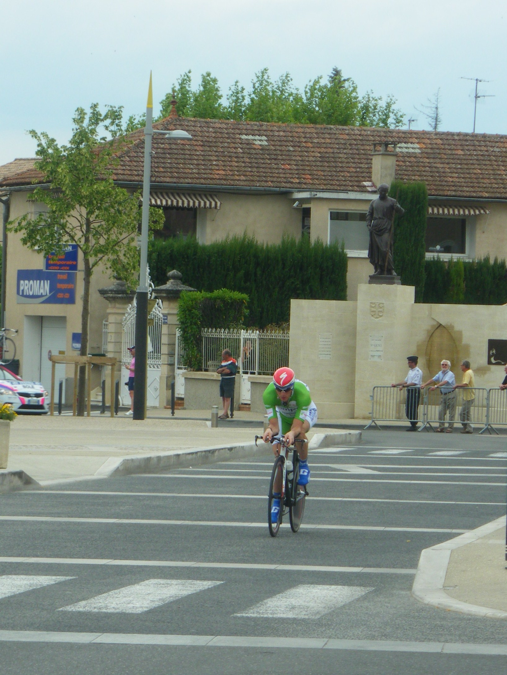 Grega Bole lors de la 3ème étape du Dauphiné Libéré 2010 (Monteux - Sorgues)